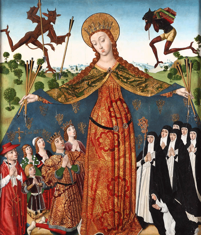 La obra muestra a los Reyes Católicos, Isabel I de Castilla y Fernando II de Aragón, junto a la Virgen de la Misericordia y los siguientes personajes: El príncipe Juan de Aragón (1478-1497), hijo primogénito de los Reyes Católicos. La infanta Isabel de Aragón (1470-1498), hermana del anterior y reina consorte de Portugal. La infanta Juana (1479-1555), que llegaría a reinar en Castilla y Aragón como Juana I. El cardenal Pedro González de Mendoza (1428-1495), arzobispo de Toledo y canciller mayor de Castilla. A la derecha aparecen seis monjas vestidas con el hábito cisterciense y rezando. Y junto a ella aparece una abadesa con su báculo que ha sido identificada con la hermana del dicho cardenal, Leonor de Mendoza, que fue abadesa del monasterio de las Huelgas de Burgos entre 1486 y 1499.